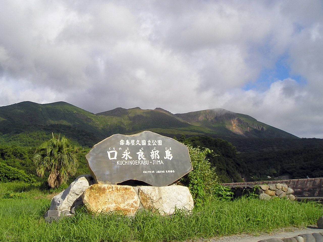 口永良部島（鹿児島県屋久島町）の本村集落から見る、活火山の山々。